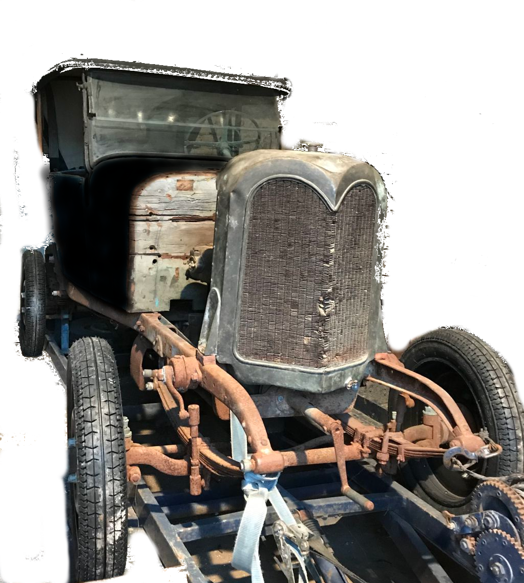 Sortie de Grange SERF